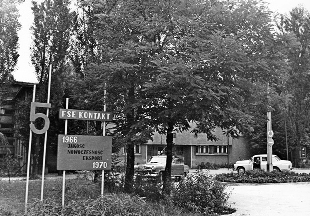 Siedziba firmy FSE KONTAKT. 1970 rok.